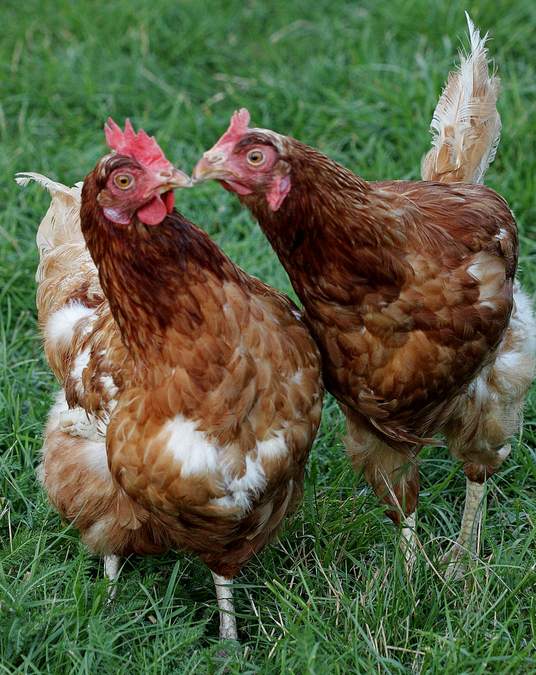 fot. Mirela Kowalska